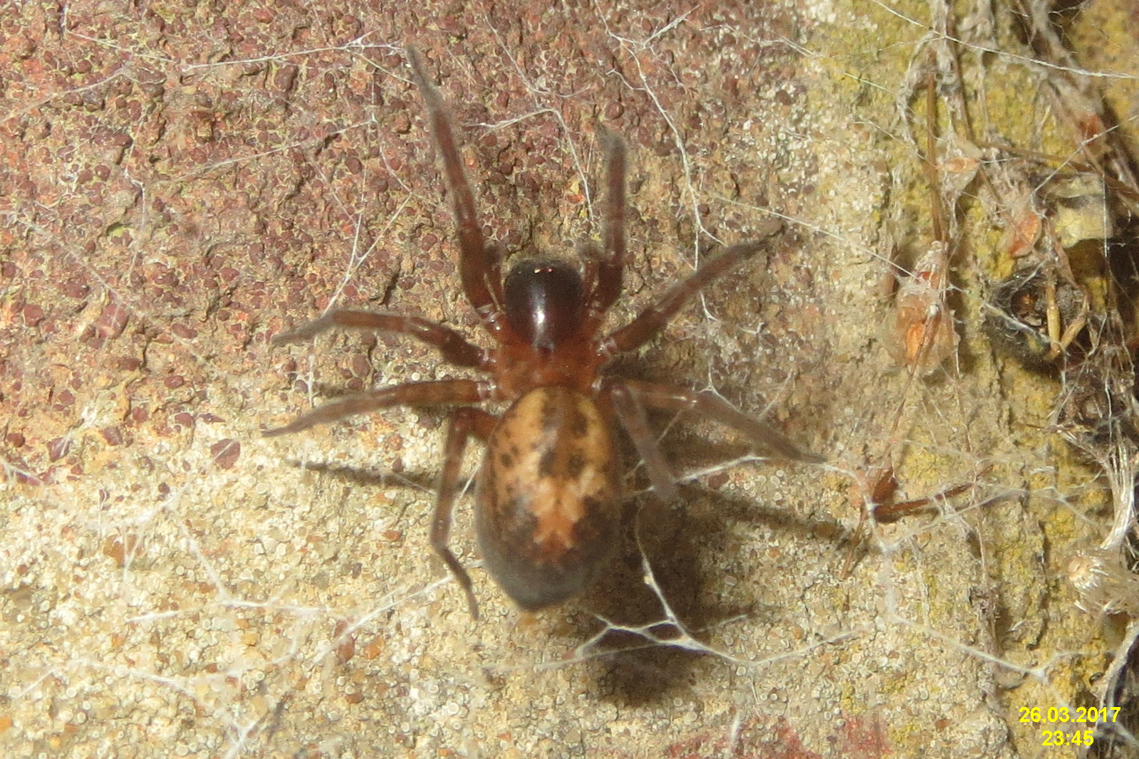 Perhaps Amaurobius similis.